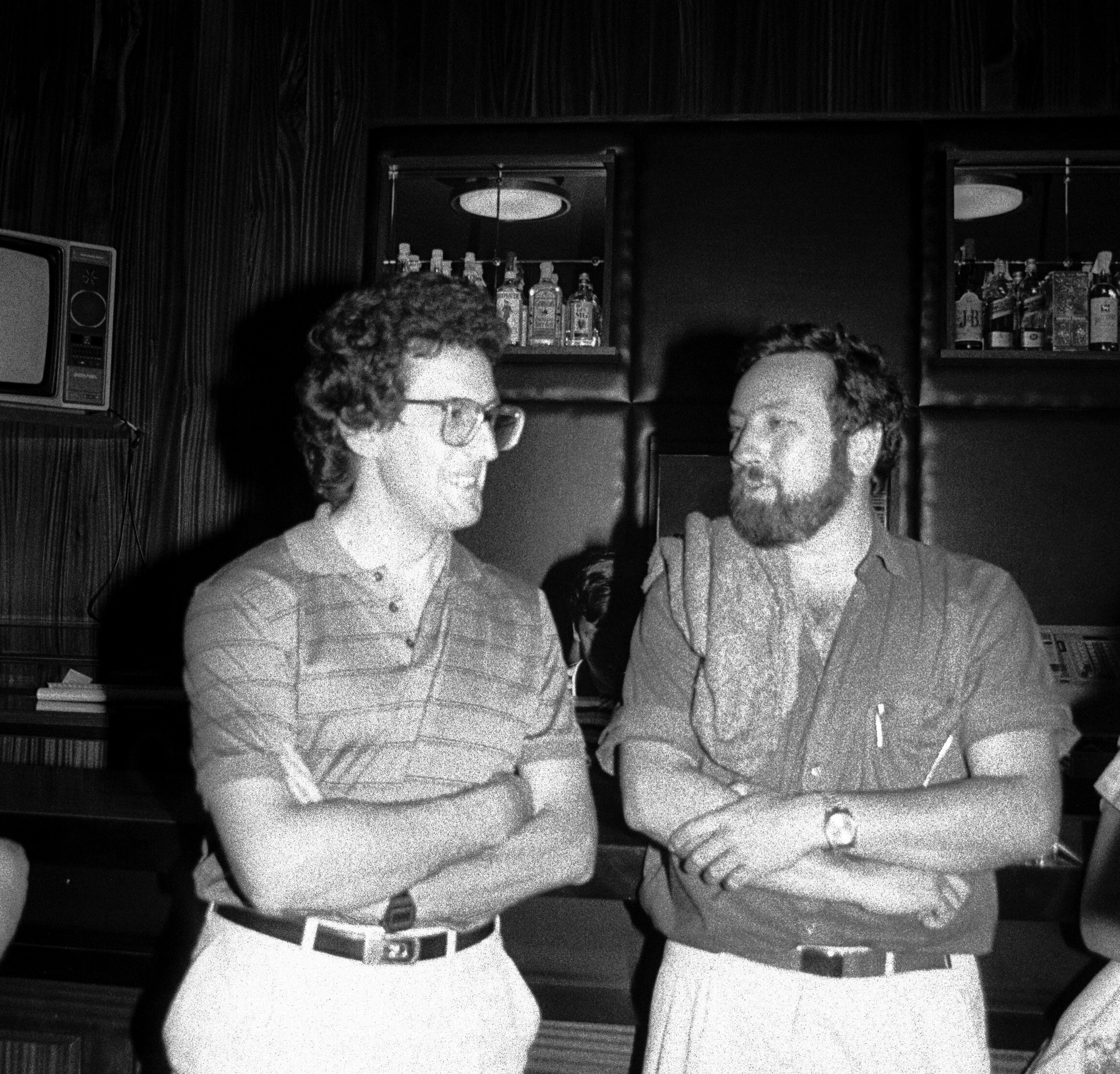 Pedro Miguel Etxenike eta Luis Mari Bandres solasaldian, Iruñea 1983